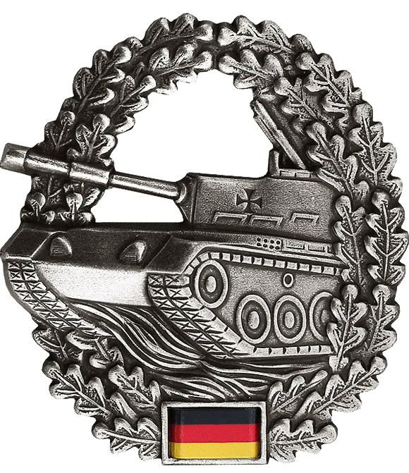 Barettabzeichen der Panzertruppe der Bundeswehr Barettfarbe: Schwarz Maße: Hoch: 53mm Breit: 46mm Ausführung: altsilber, Metall